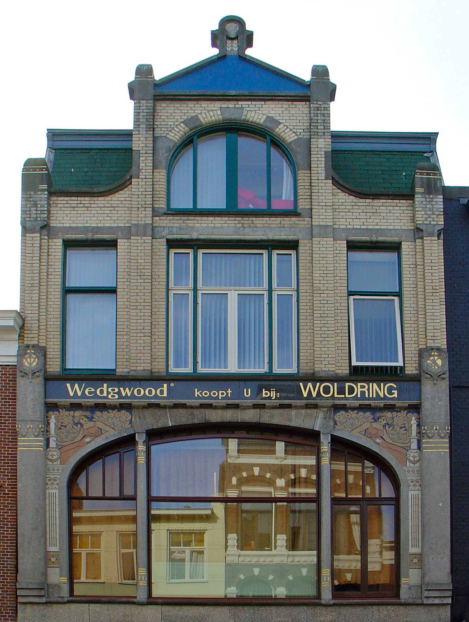 Art nouveau Oosterstraat 19 ontworpen door Antonius Theodorus van Elmpt